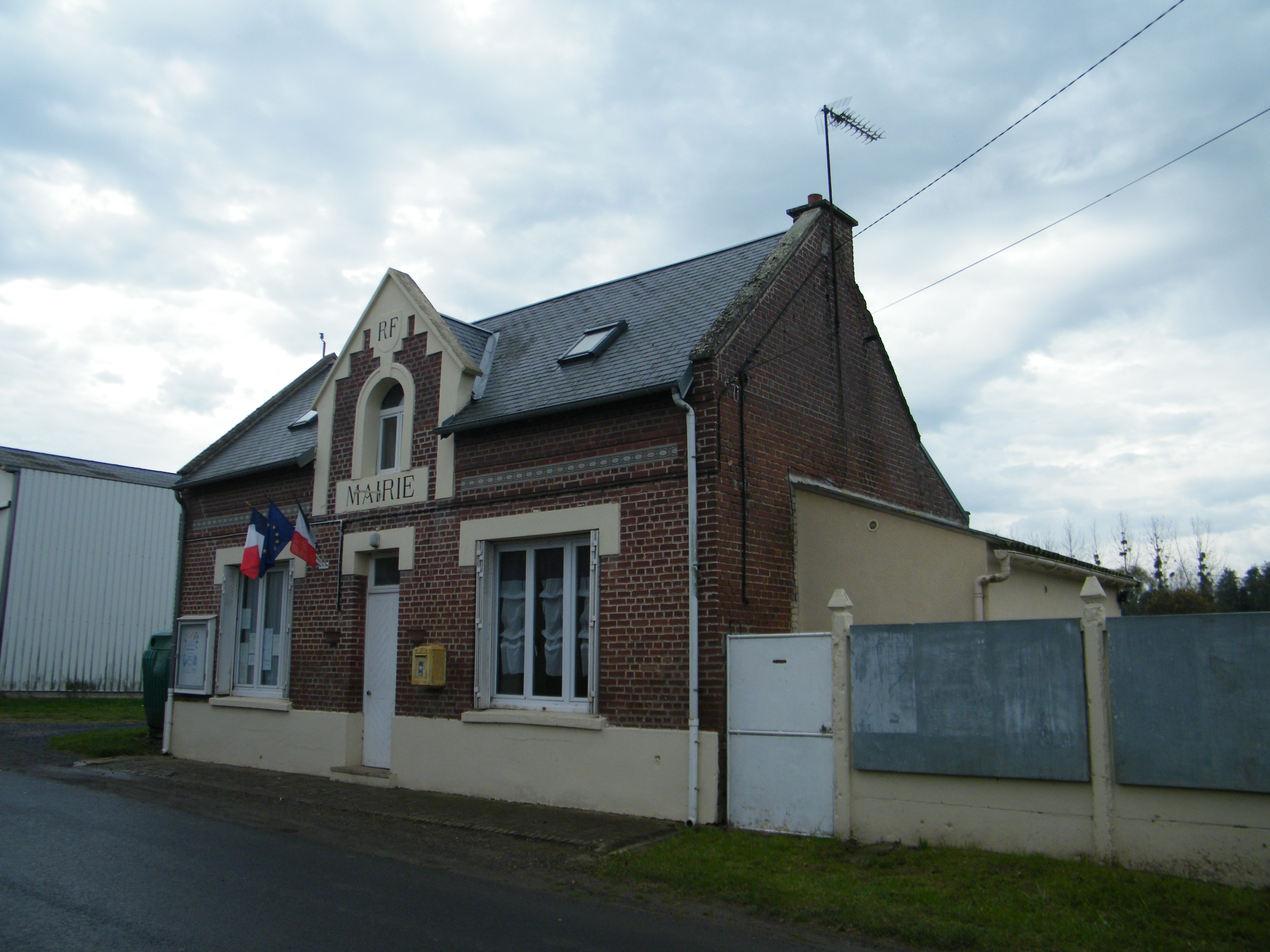 Mairie.